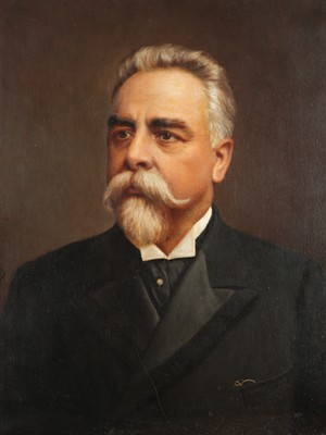 Pintura de Campos Sales da Presidência da República Federativa do Brasil.